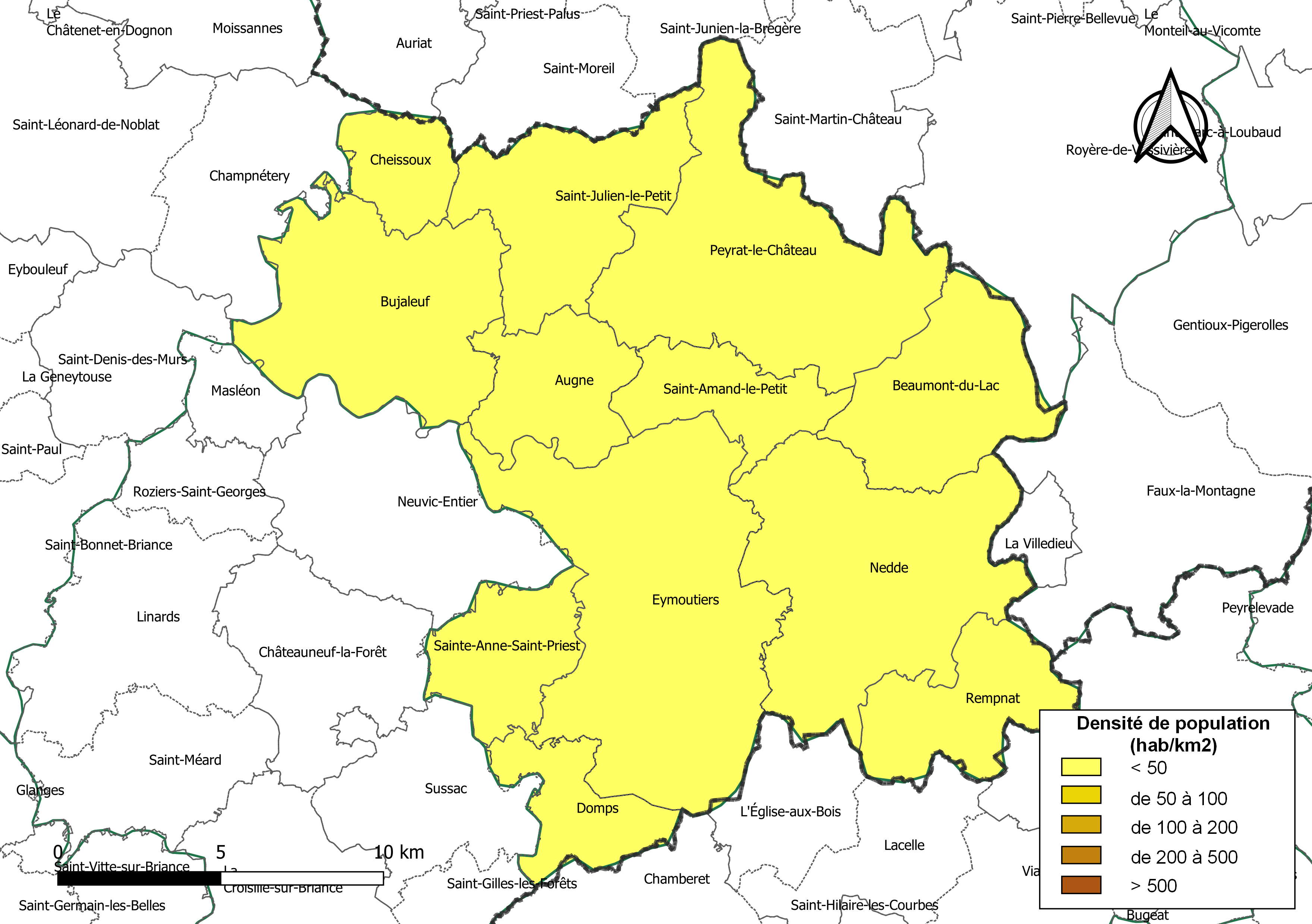 Carte des densités de population (millésimée 2016) des communes de la Communauté de communes des Portes de Vassivière, département de la Haute-Vienne, France. Composition au 1er janvier 2019.